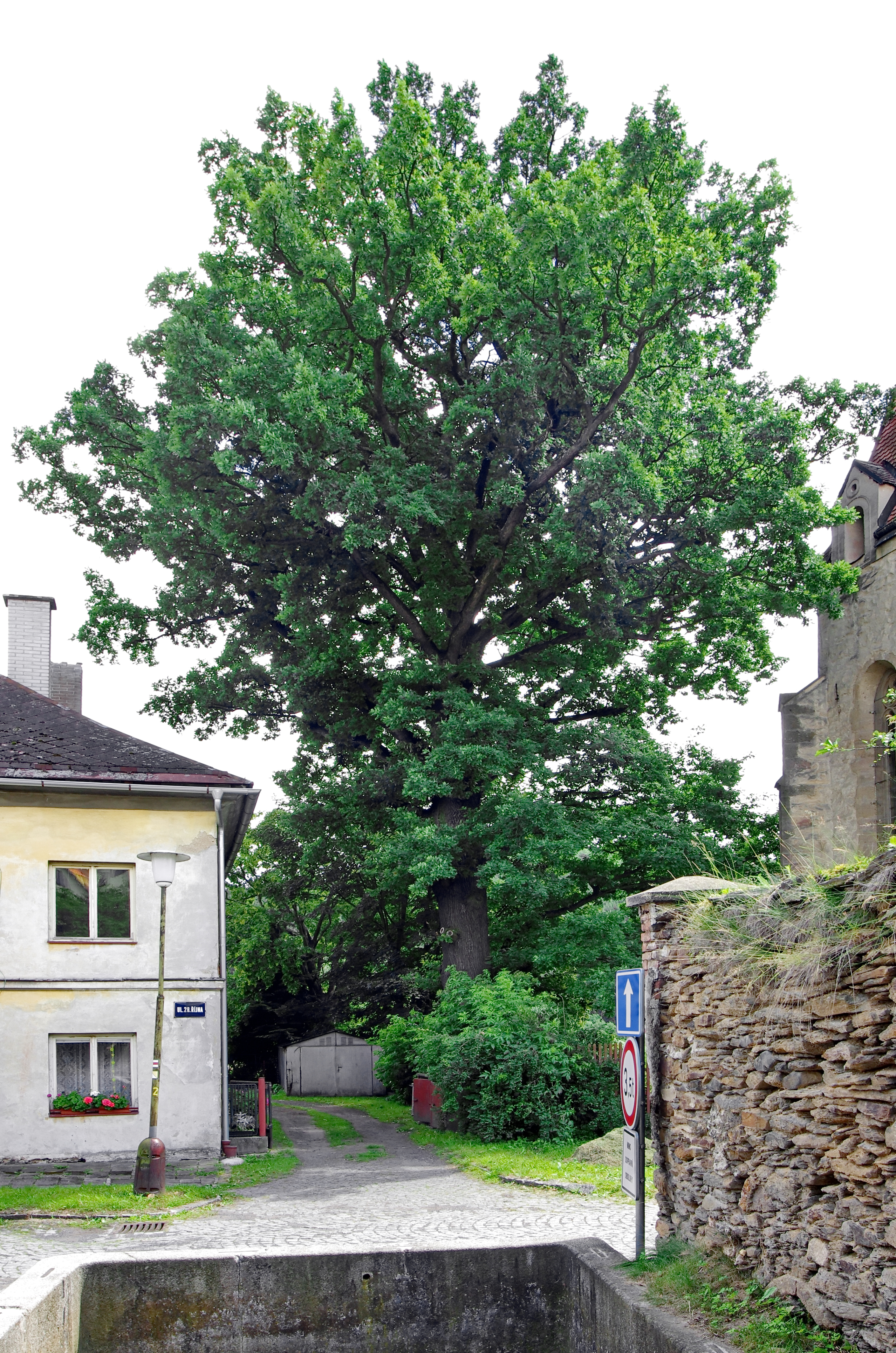 Památný strom - Žlutický dub ve Žluticích, okres Karlovy Vary